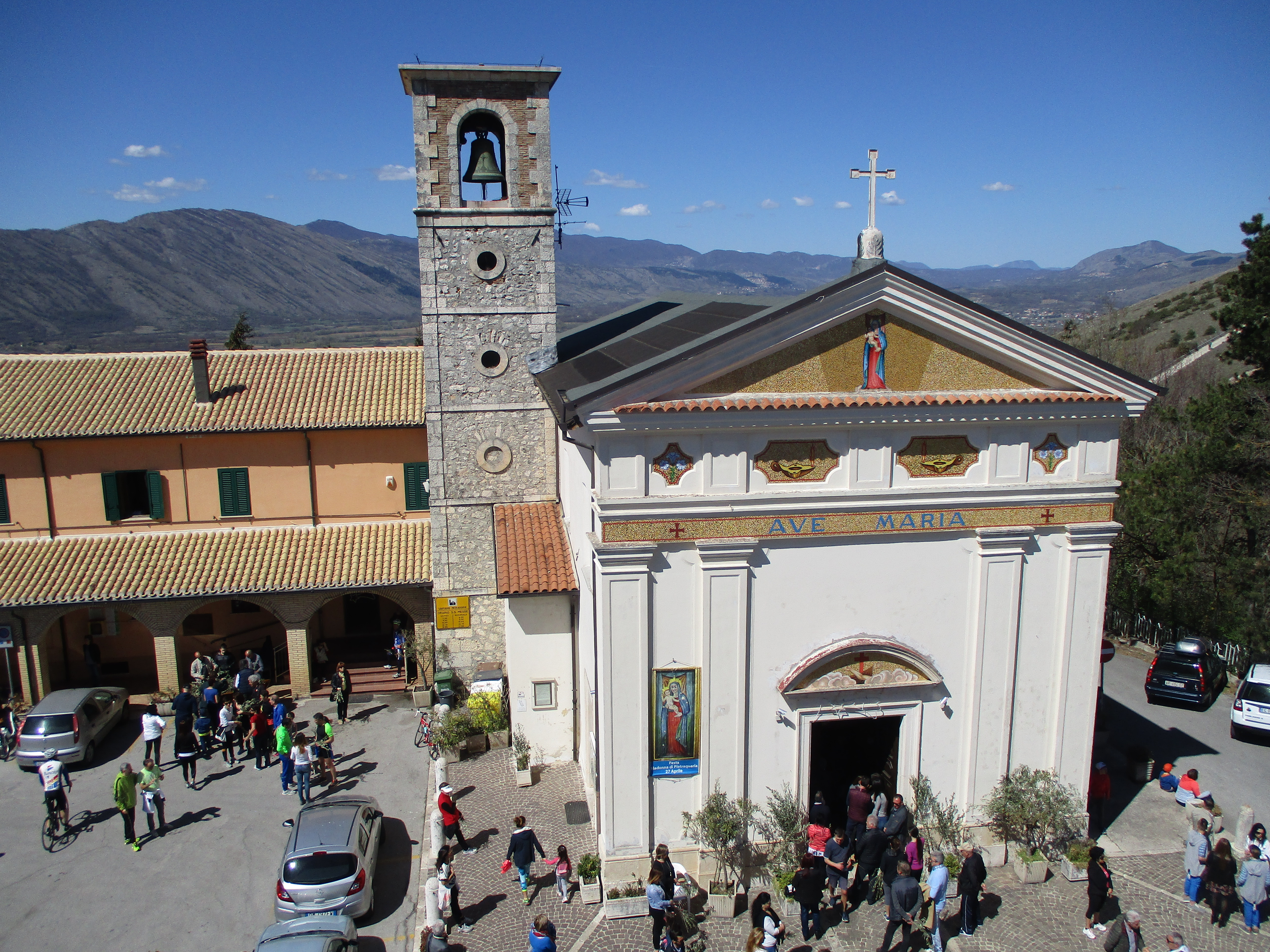 Santuario della Madonna di Pietraquaria